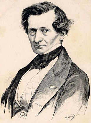 Hector Berlioz en 1855